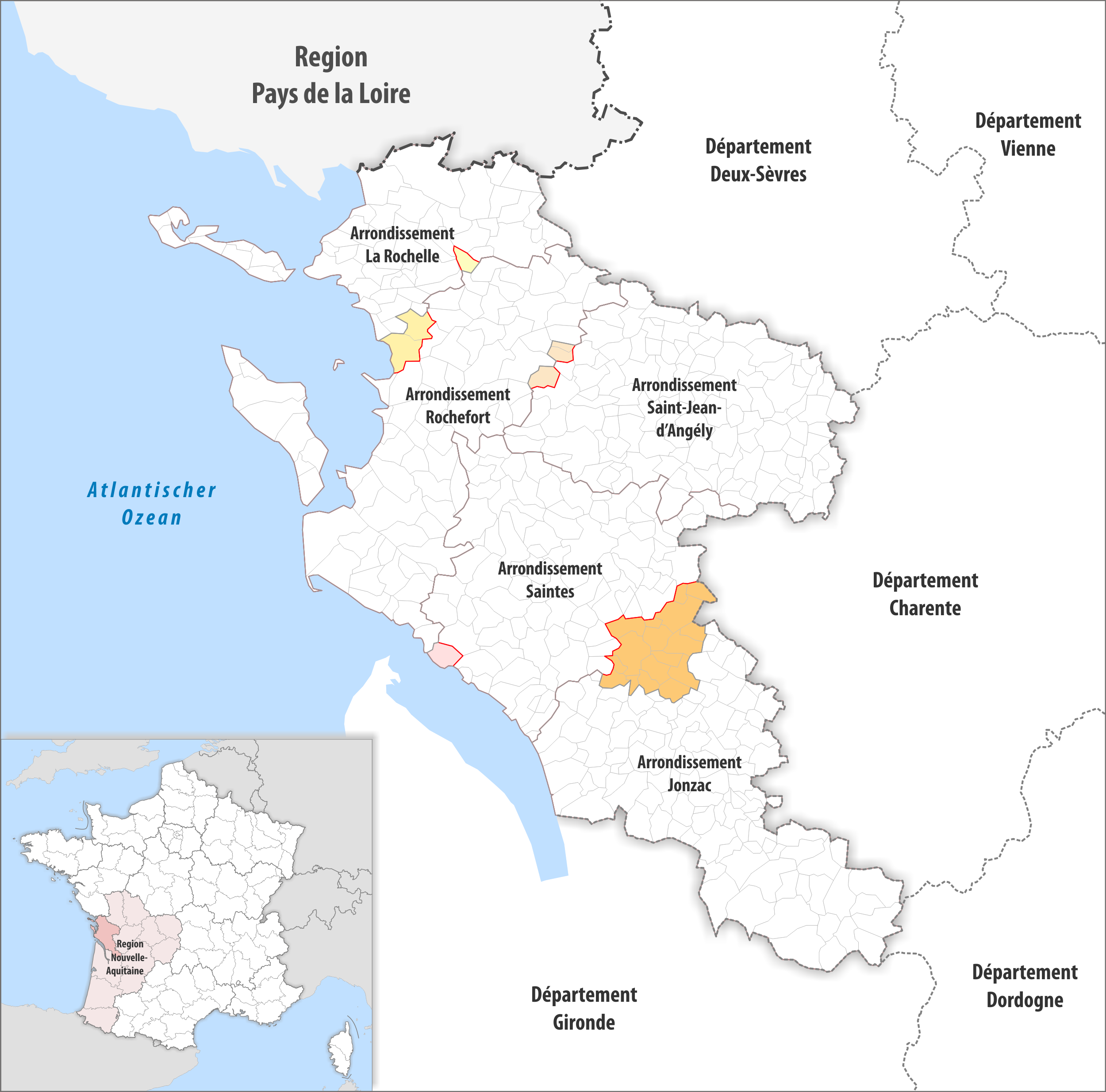 Arrondissements Anpassungen auf 2017 im Departement Charente-Maritime